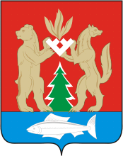 Герб Красноселькупского района ЯНАО